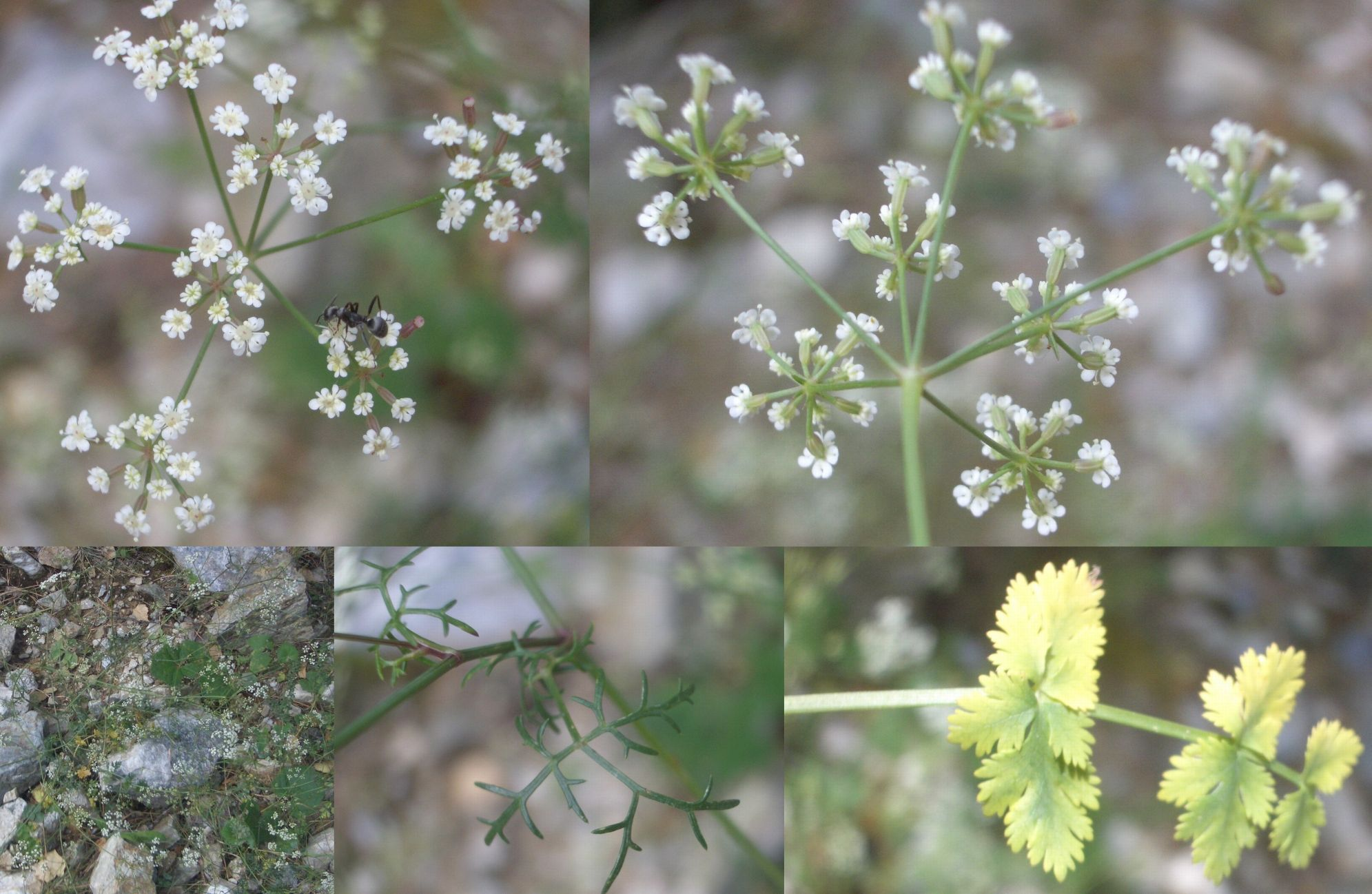 Ptychotis saxifraga - Apiaceae - plusieurs vues